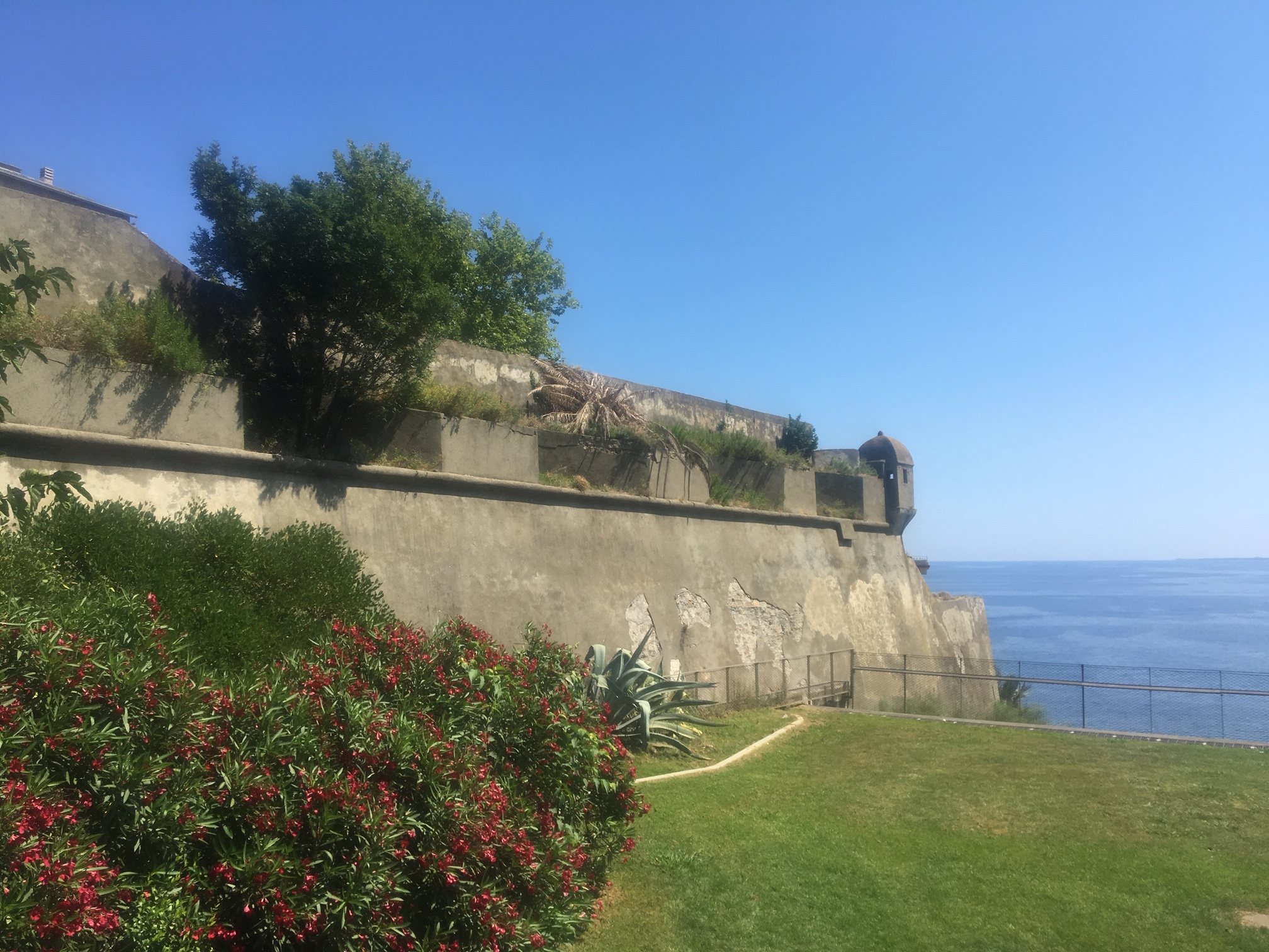 Le bastion génois de Santa Maria, citadelle de Bastia, Corse